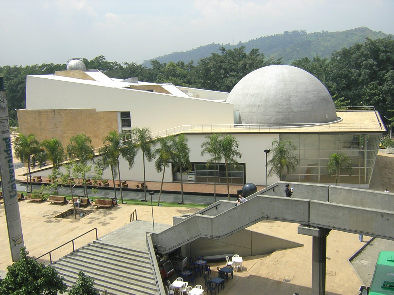 Planetario de Medellín, Colombia.